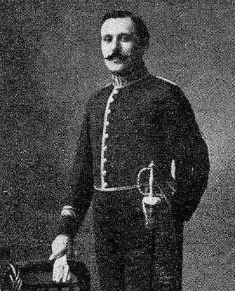 Urbano Feijoo de Sotomayor Ron, foto en Vida Gallega, 1920